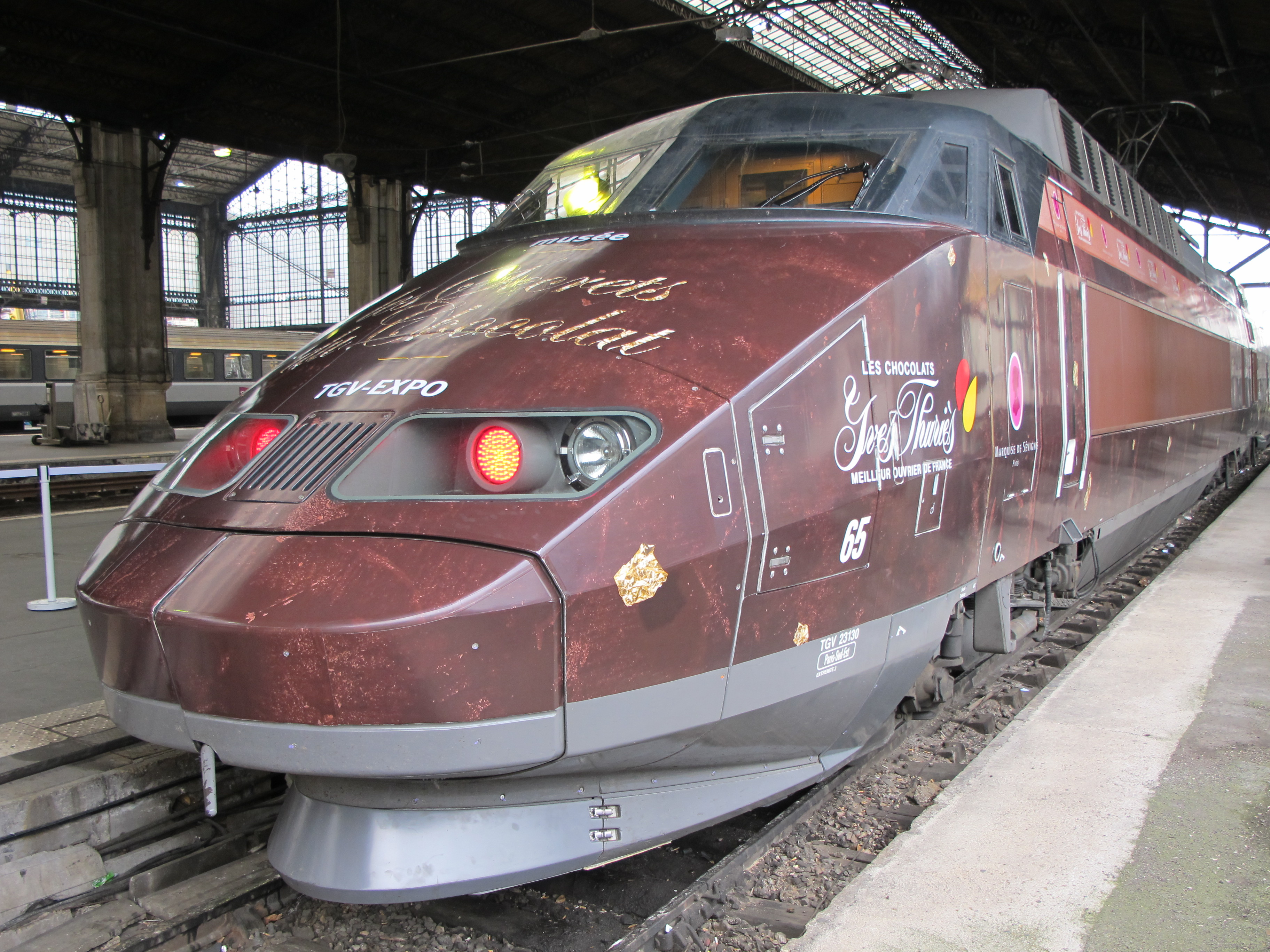 Train du musée des secrets du chocolat en gare d'Austerlitz le 30/11/2012. Paris. France